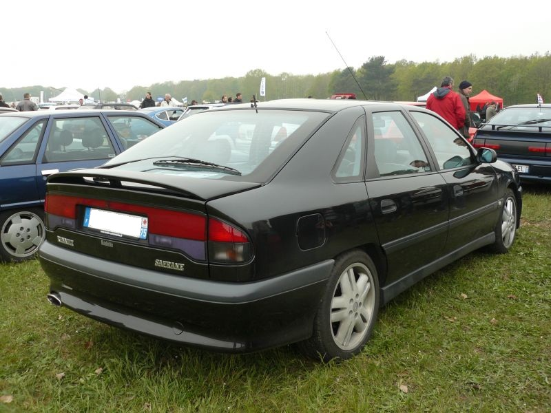 Français cadien: Montlhery Avril 2012